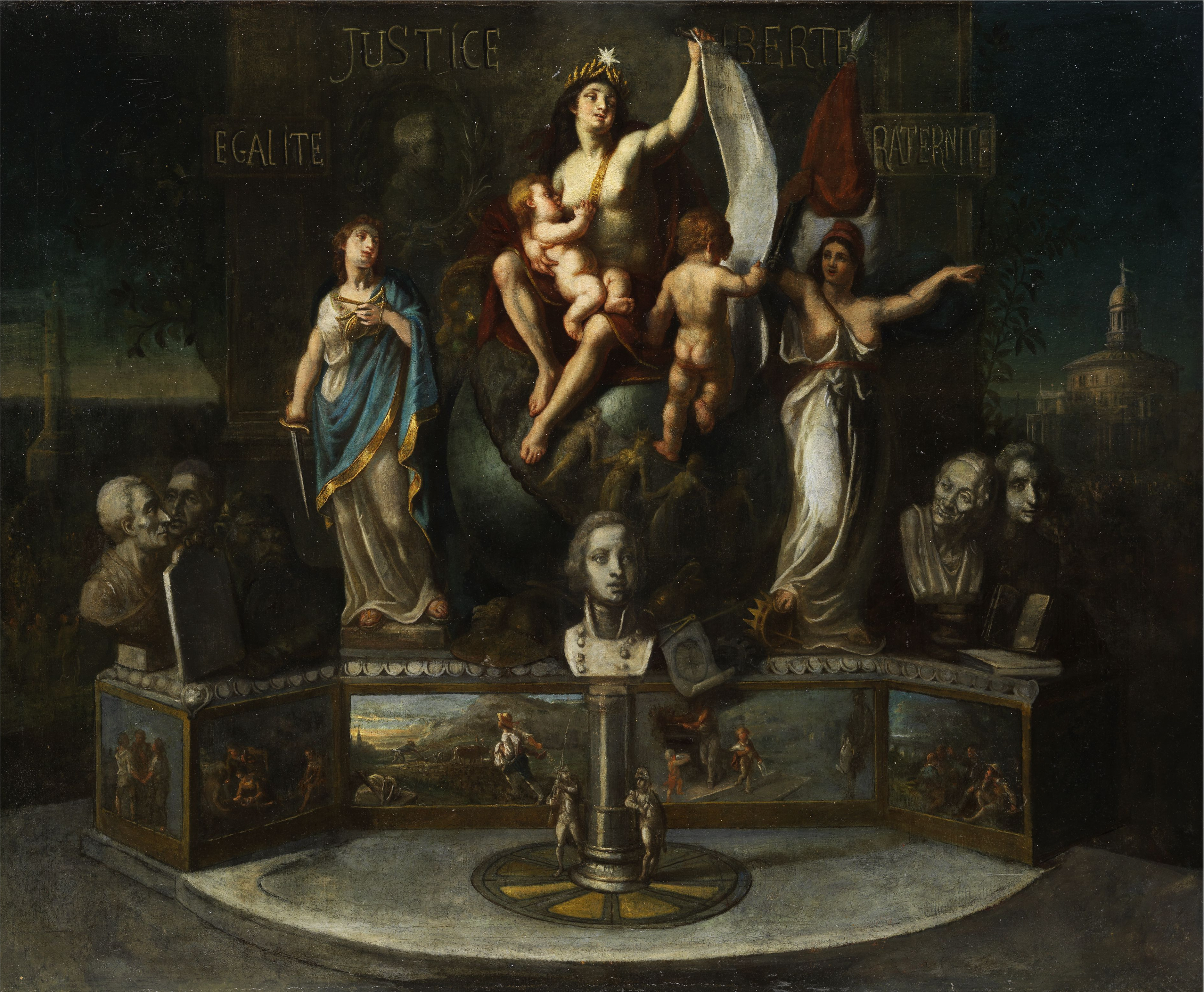 Allegorie auf die Werte der Verfassung nach der Französischen Revolution